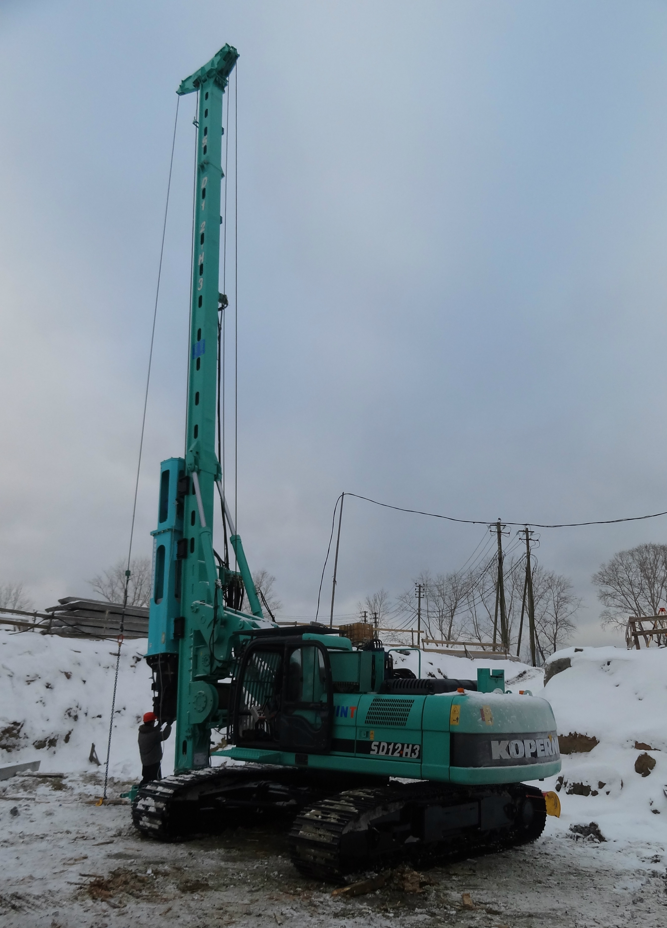 Полноповоротый копер Kopernik SD-12 с гидравлическим молотом BRUCE SGH-0312 на строительстве ЖК "Олимпийский" г. Екатеринбург, ул.Машинная